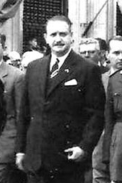 Claudio Arrechea, primer gobernador de la provincia de Misiones.